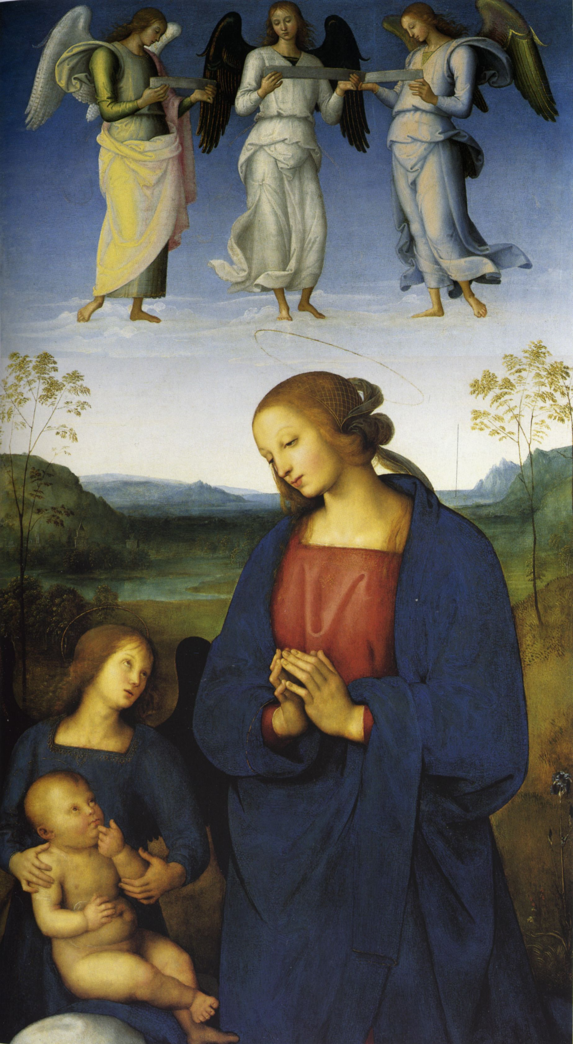 Pietro Perugino: Polittico della Certosa di Pavia (Vergine col Bambino e angeli). Cat. no. 54 in Vittoria Garibaldi: Perugino. Catalogo completo. Octavo, Firenze 2000, ISBN 88-8030-091-1